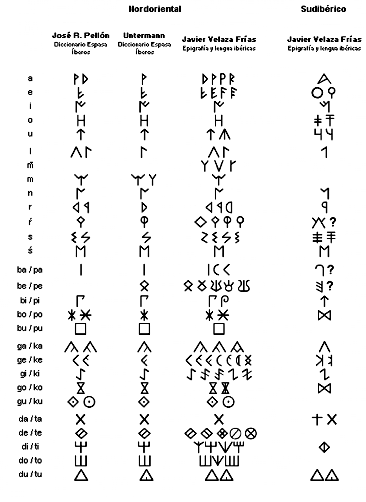 Alfabeto ibérico